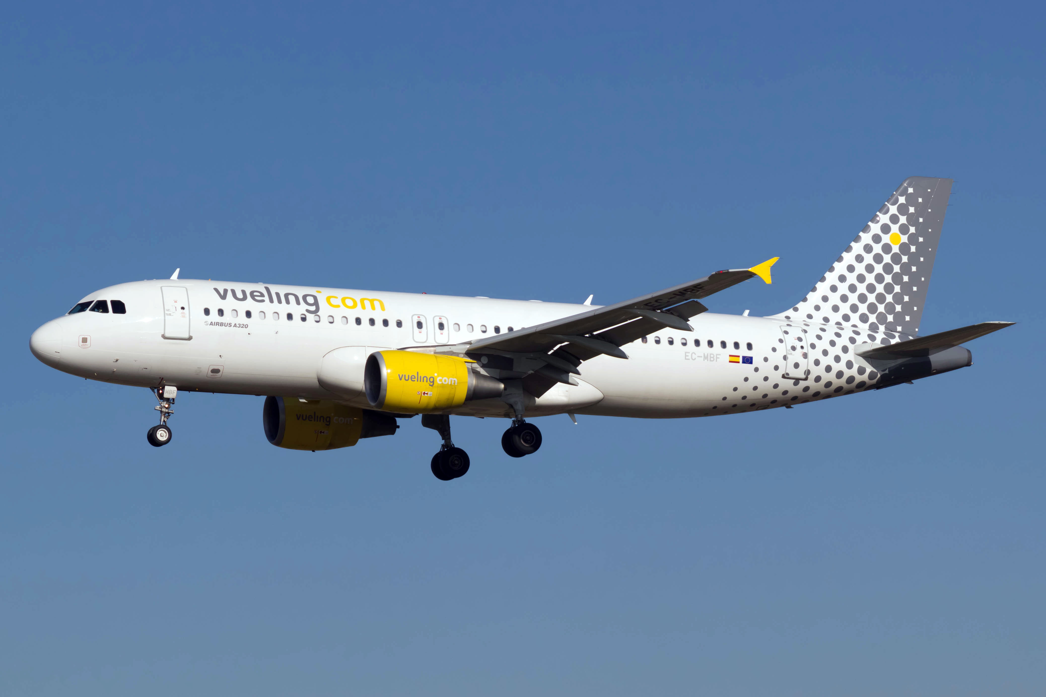 Airbus A320 de Vueling aterrando no aeroporto de Barcelona.